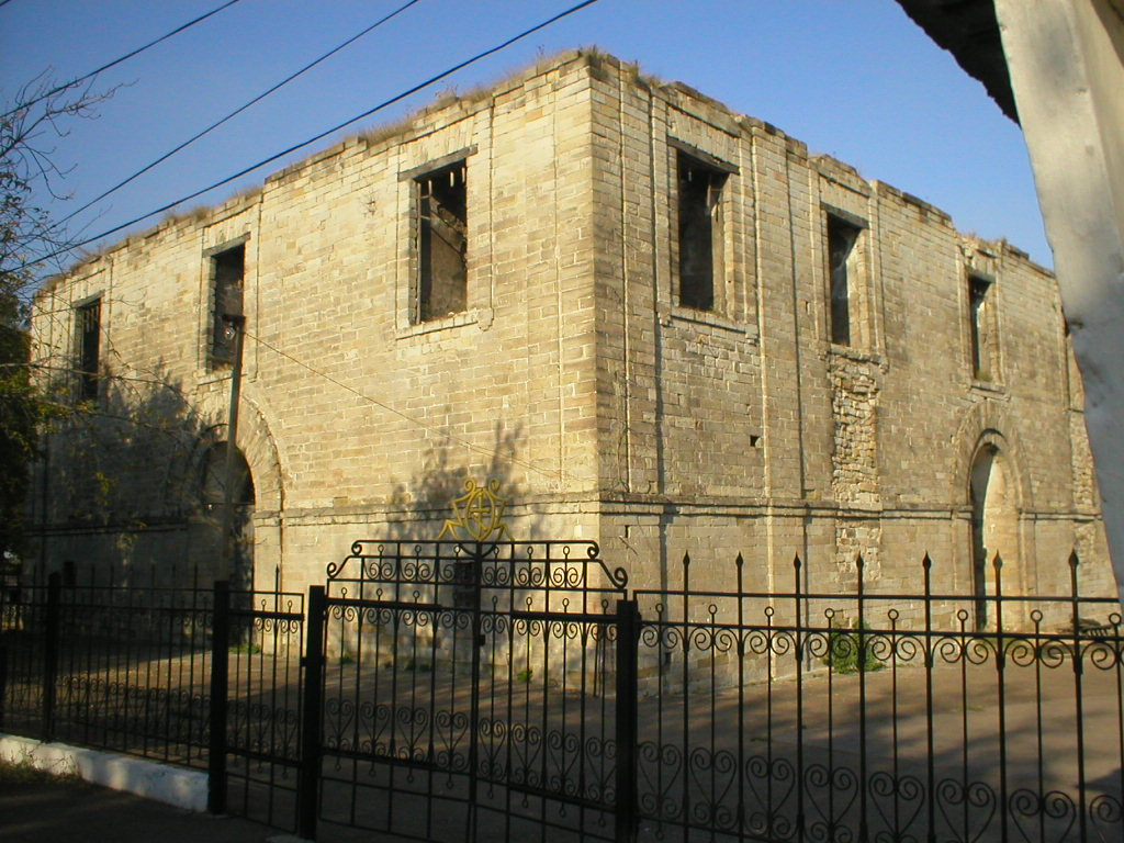 Разрушенная в 1938г. Свято-Покровская церковь, Донецкая обл., Горловский горсовет, пгт Зайцево, ул. Карбышева, 41.